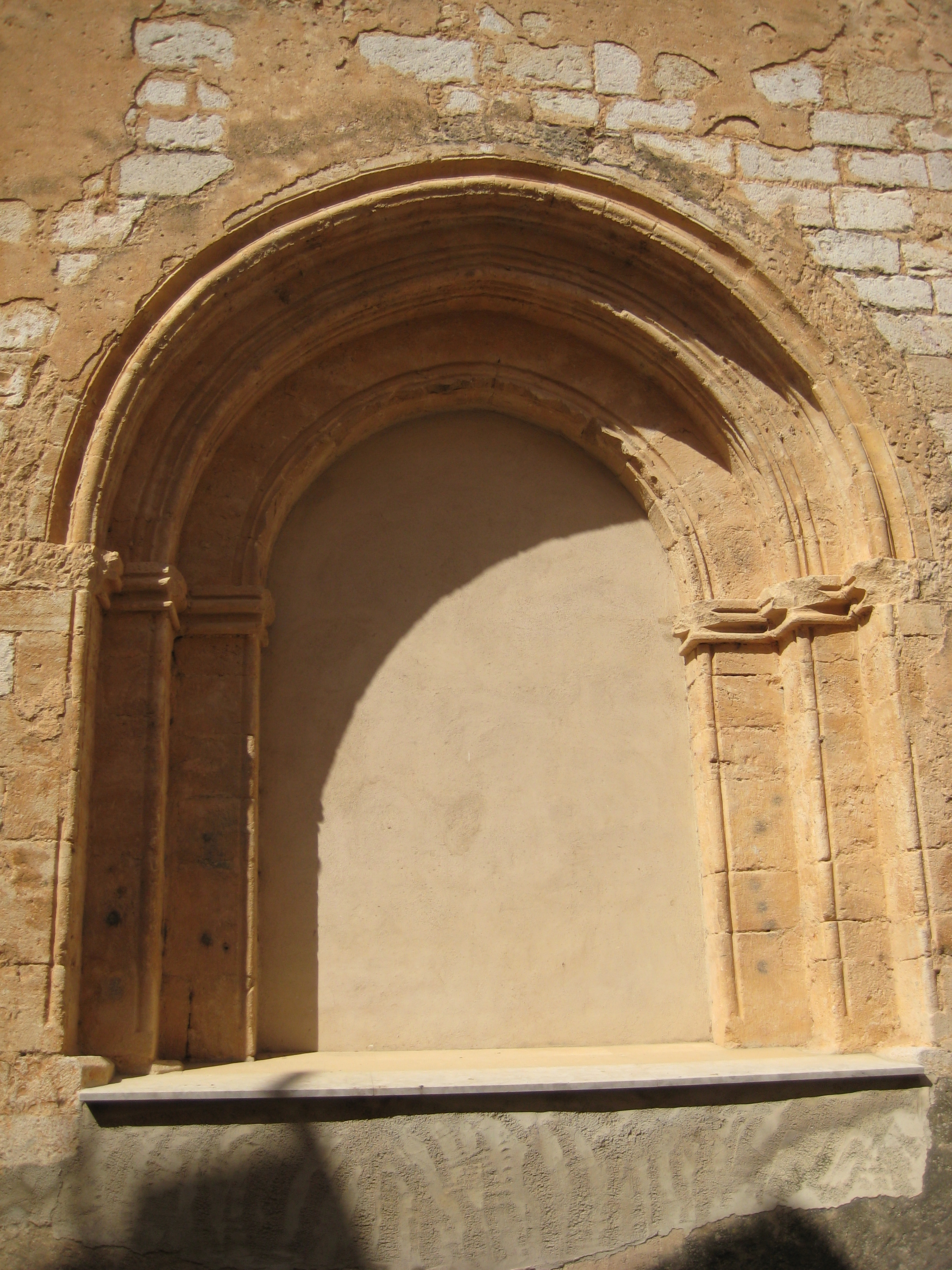 Portada primitiva de l'església de Sant Miquel Arcàngel de Canet lo Roig (Baix Maestrat)